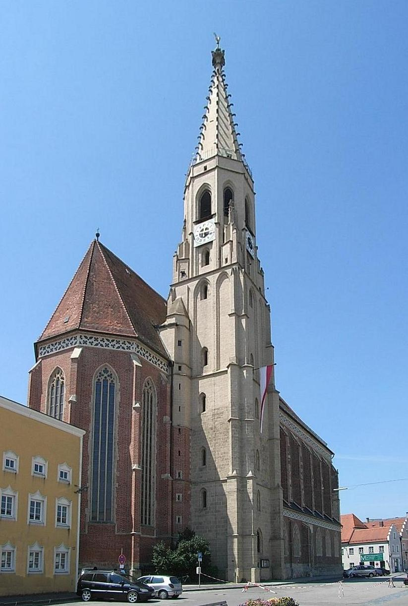 Pfarrkirche St. Nikolaus in Neuötting